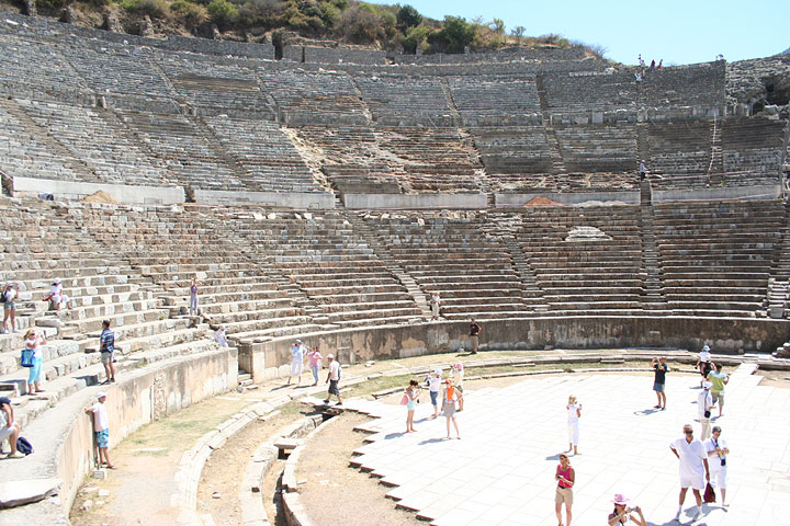 Das große Theater von Ephesos